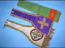 Manipulos